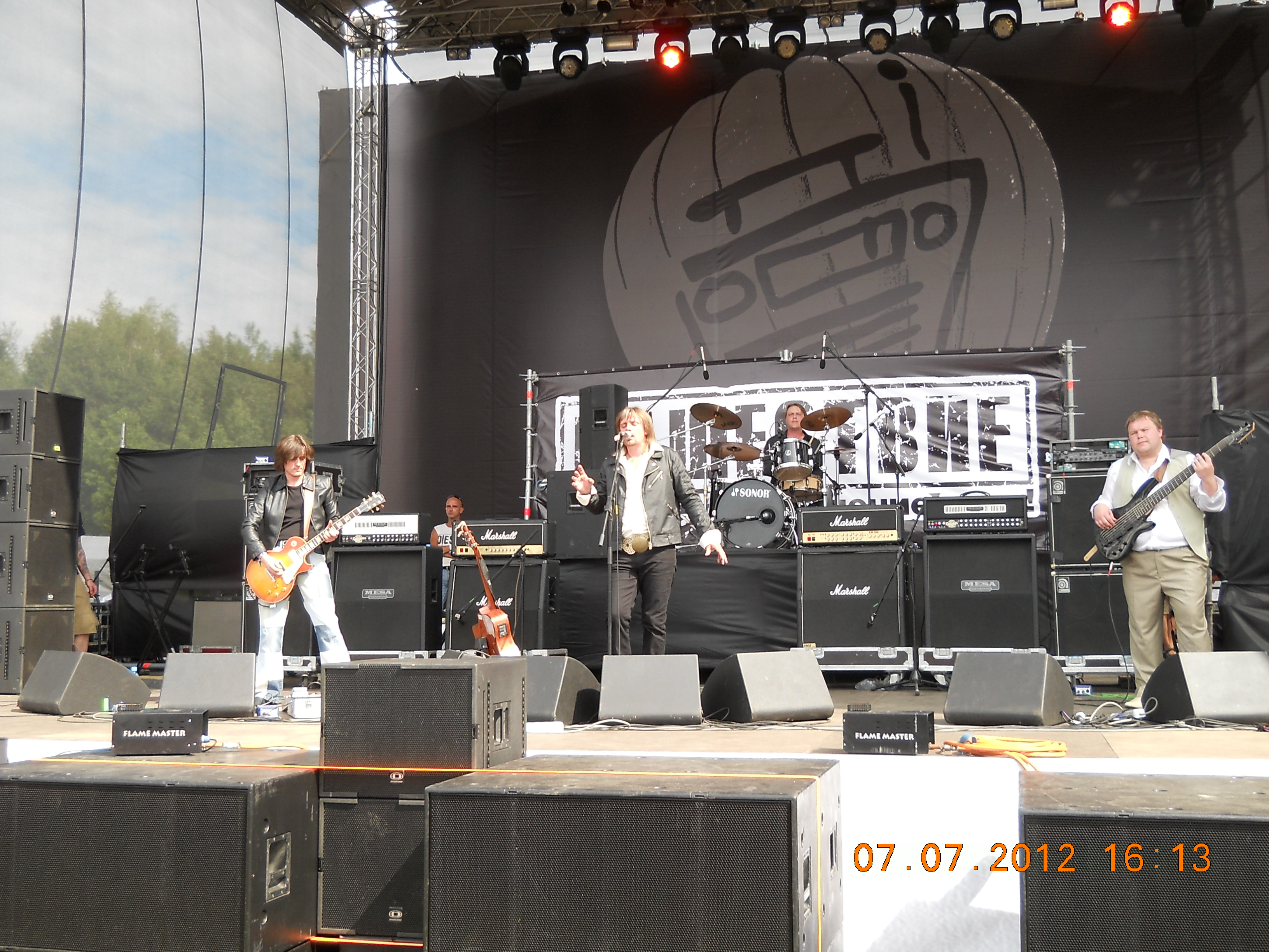 Тверская группа Река на фестивале Нашествие 2012